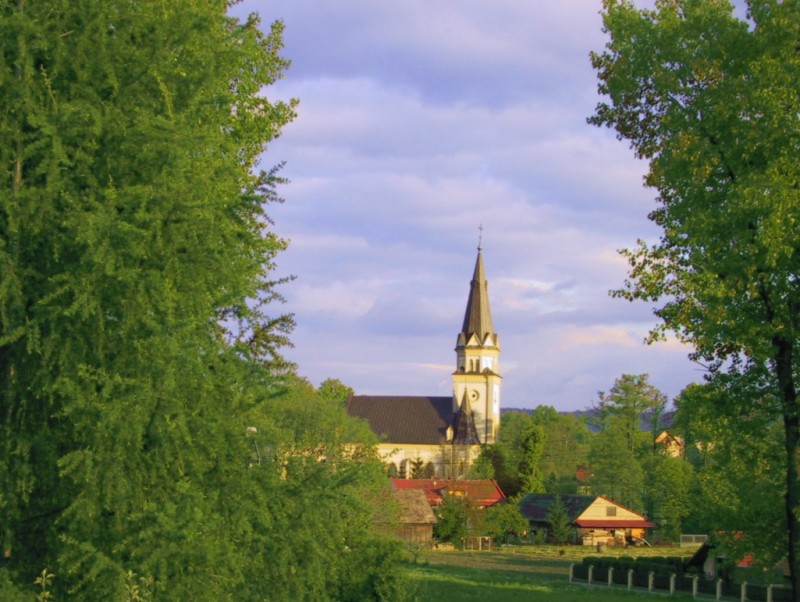 Kościół w Choczni z 1883 roku-zdjęcie wykonane przez Wikipedysta MichałKa, o zachodzie słońca w lipcu 2004.